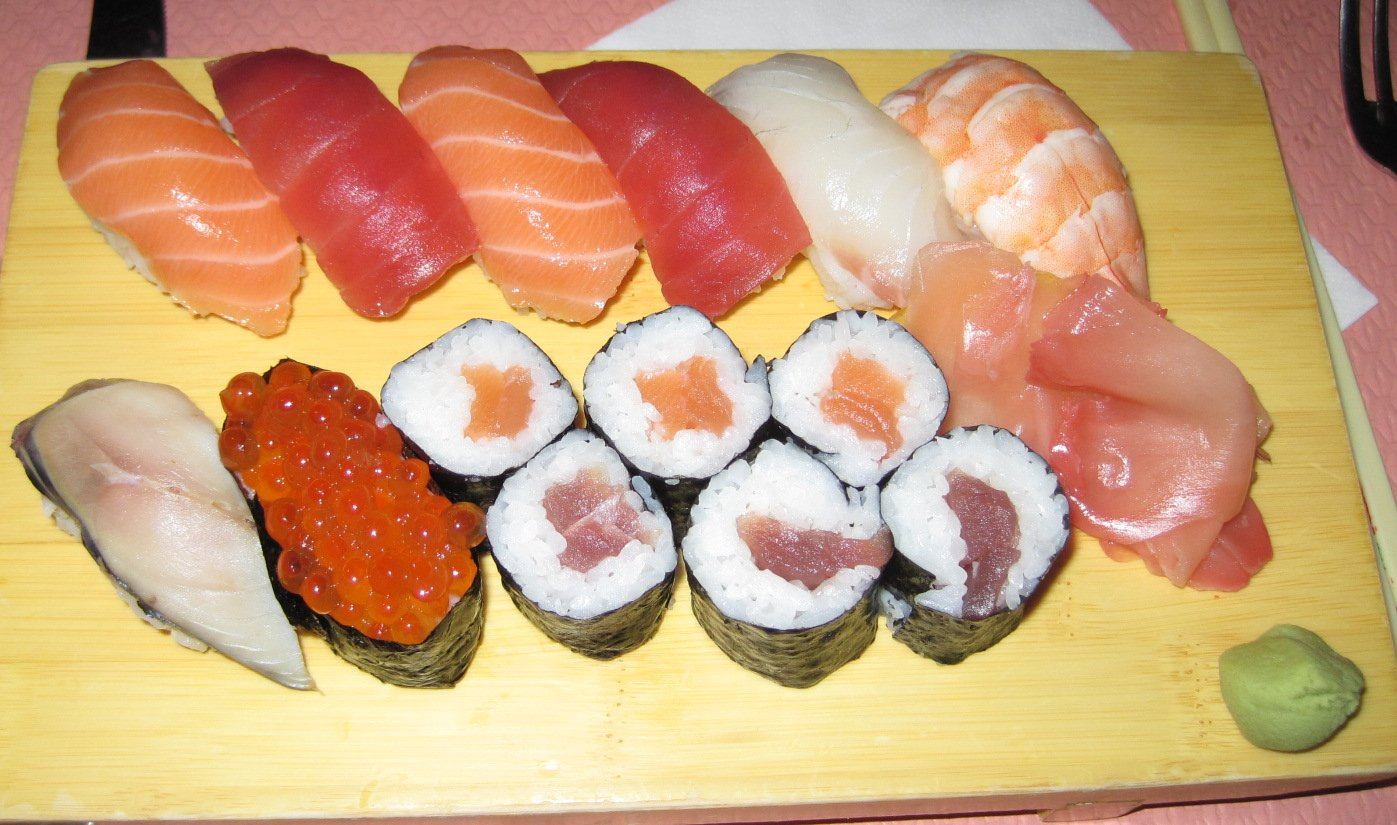 Plateau de sushis